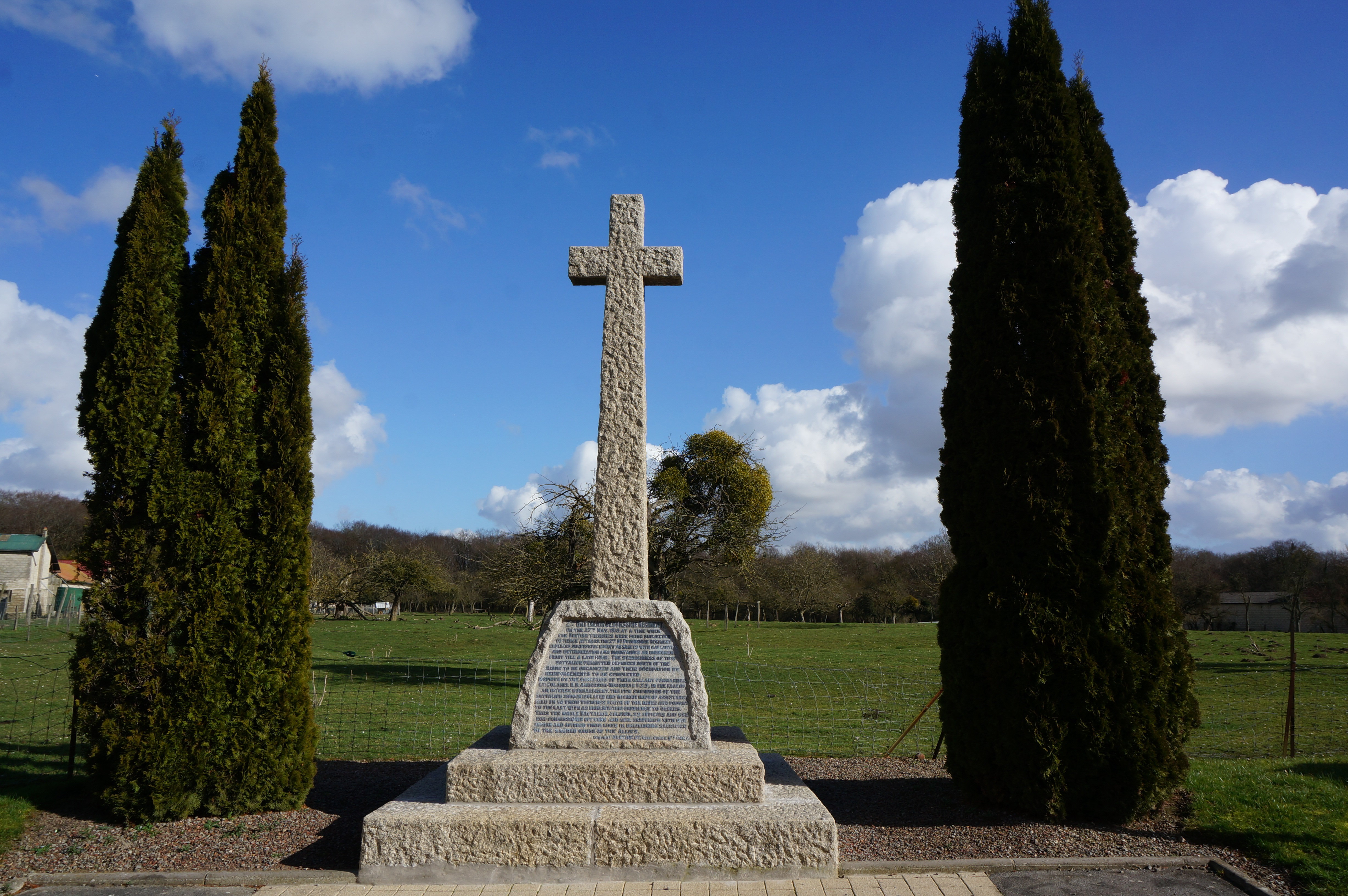 dans le village de La Ville-aux-Bois-lès-Pontavert.